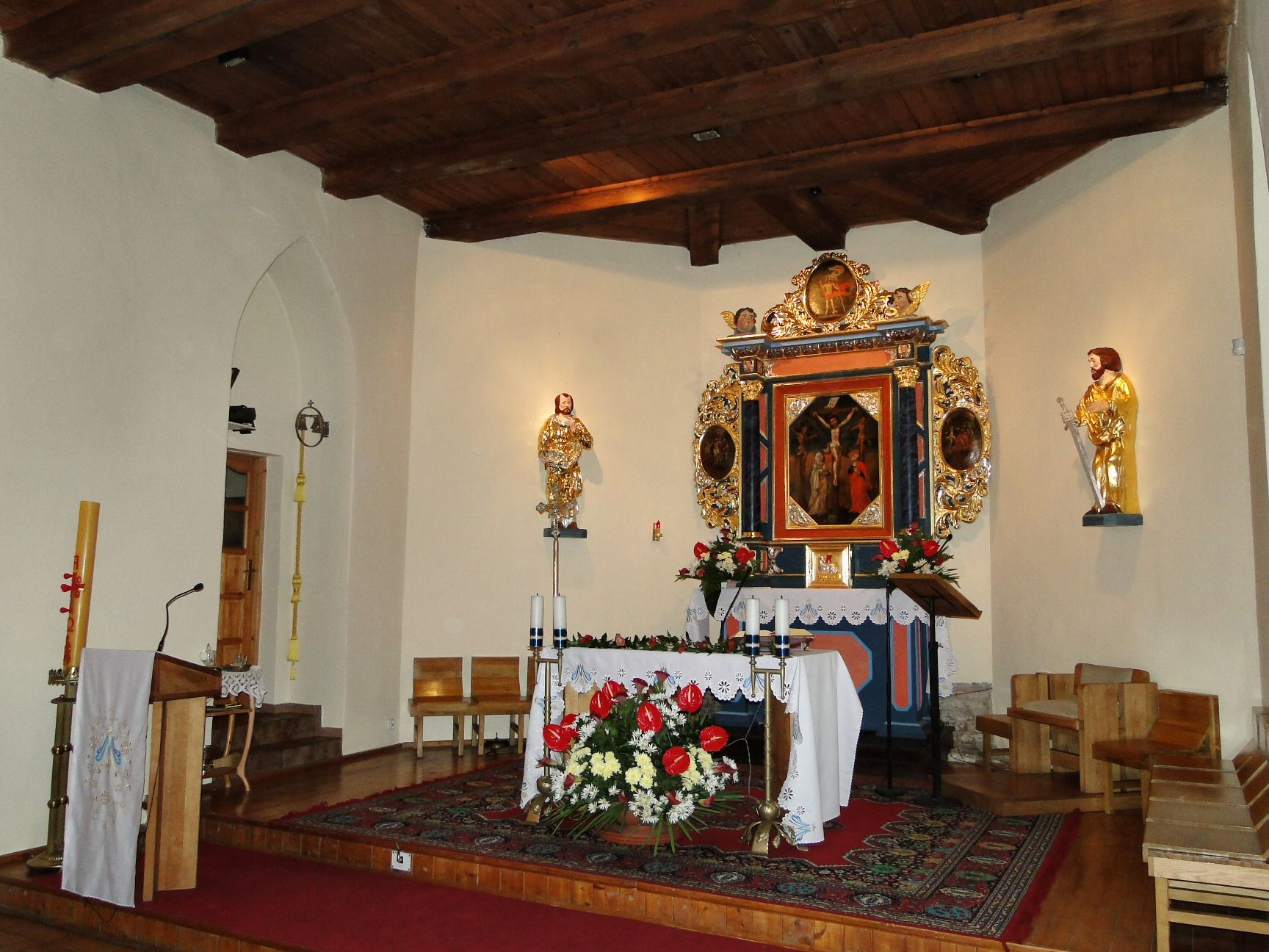 Wnętrze kościoła w Szczecinie Osowie